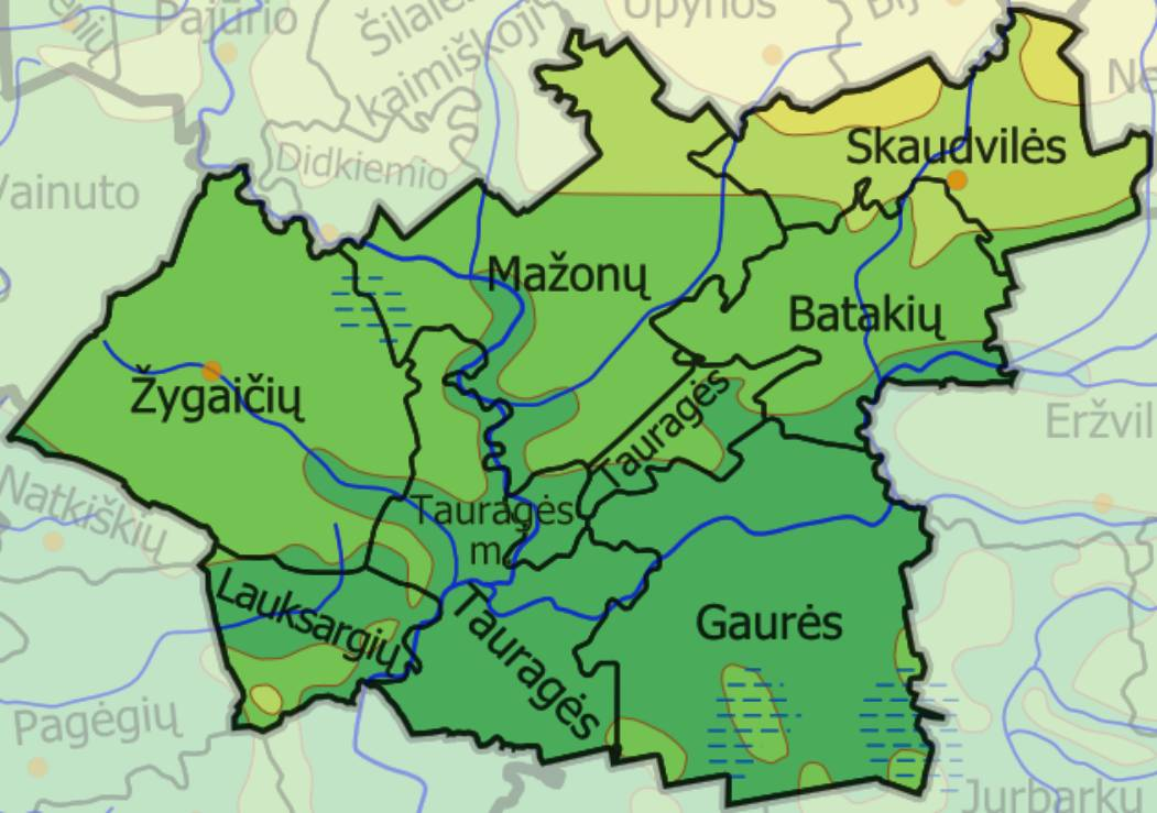 Староства Таурагского района